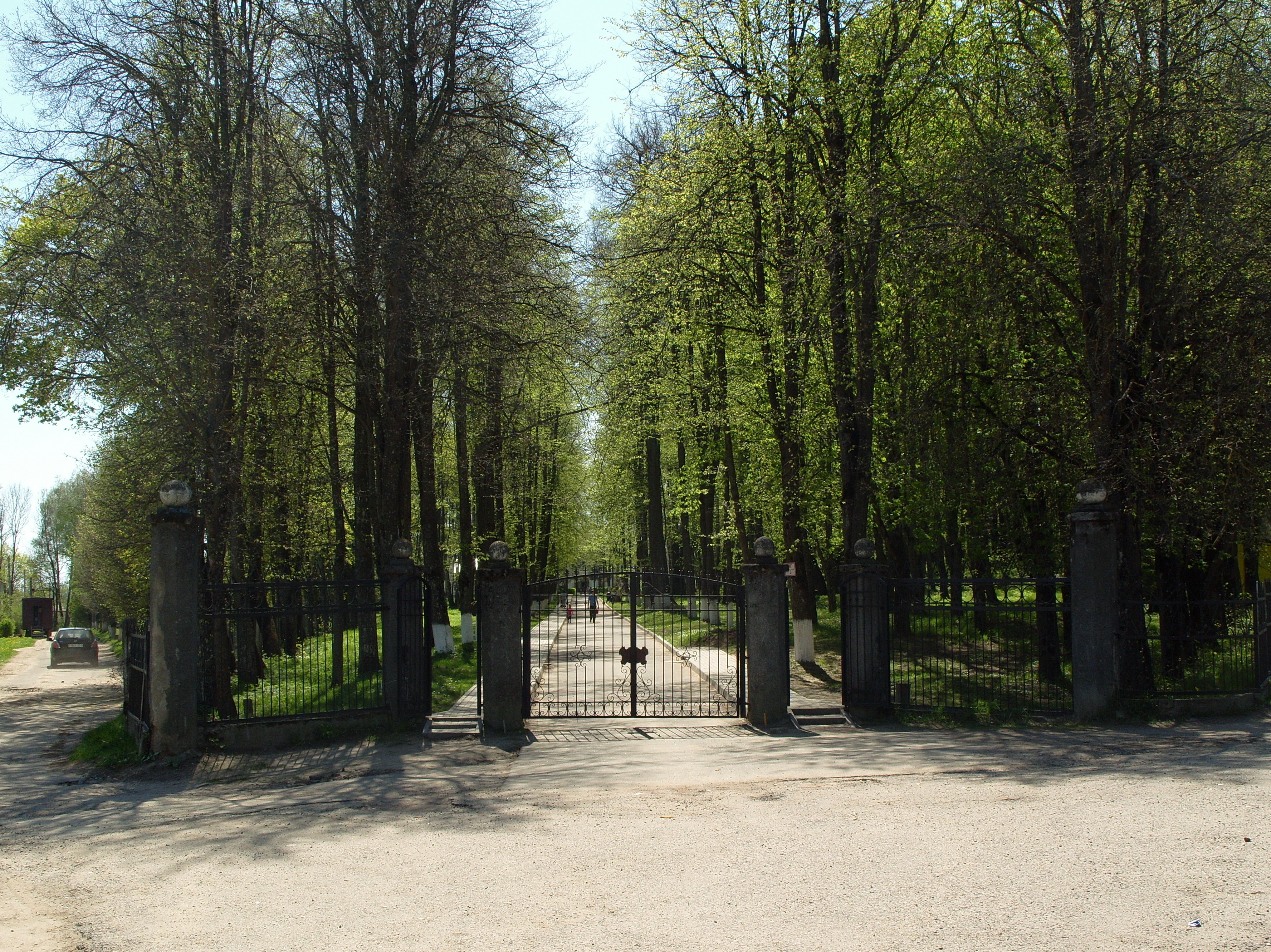 Беларуская (тарашкевіца): Уязная брама ў палац Чапскіх, Прылукі